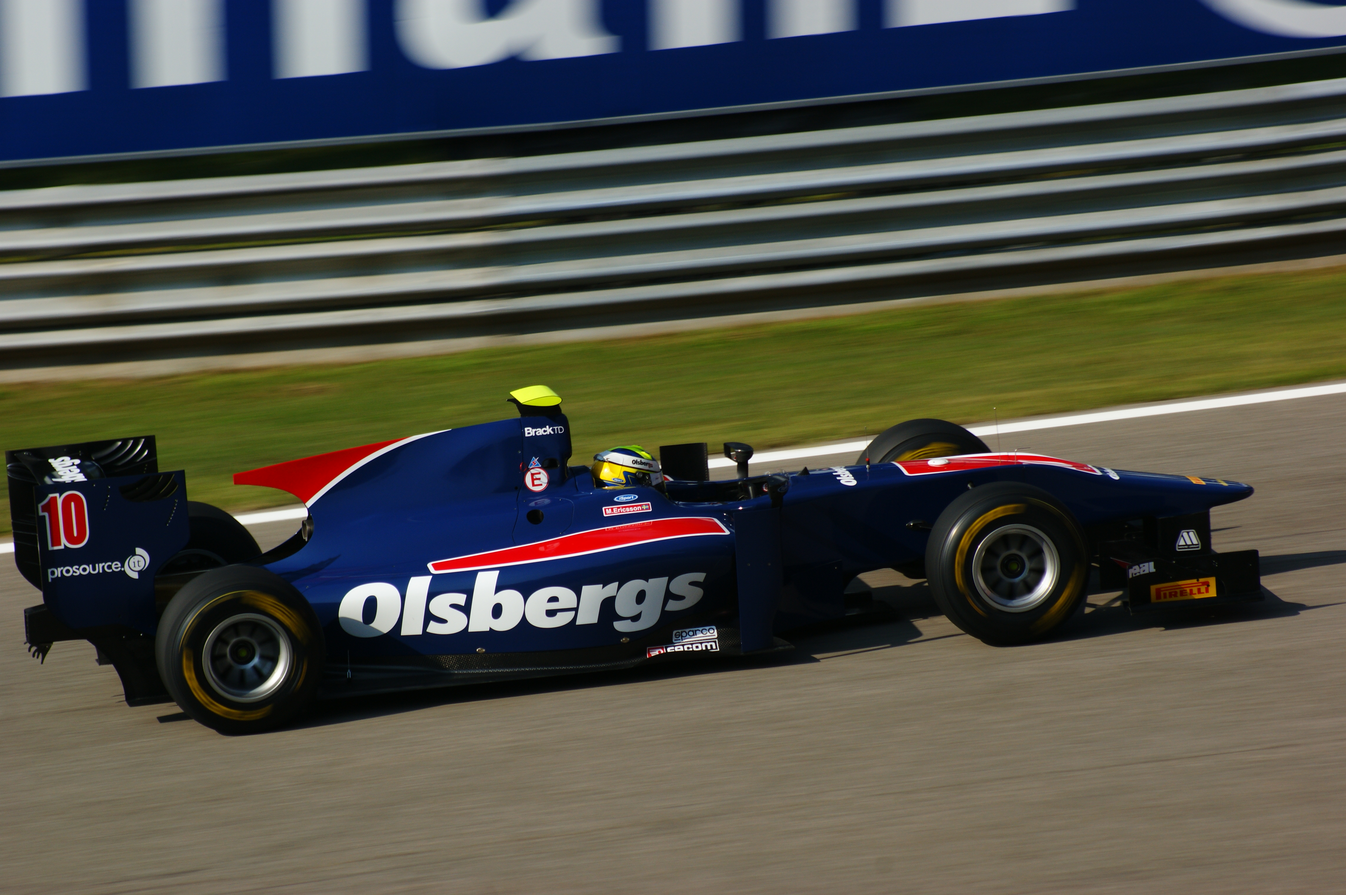 Marcus Ericsson alla variante della roggia Monza 2011